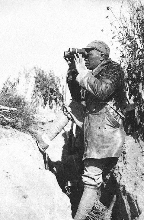 彭德怀在关家垴前线的炮团哨所观察敌情，指挥战斗